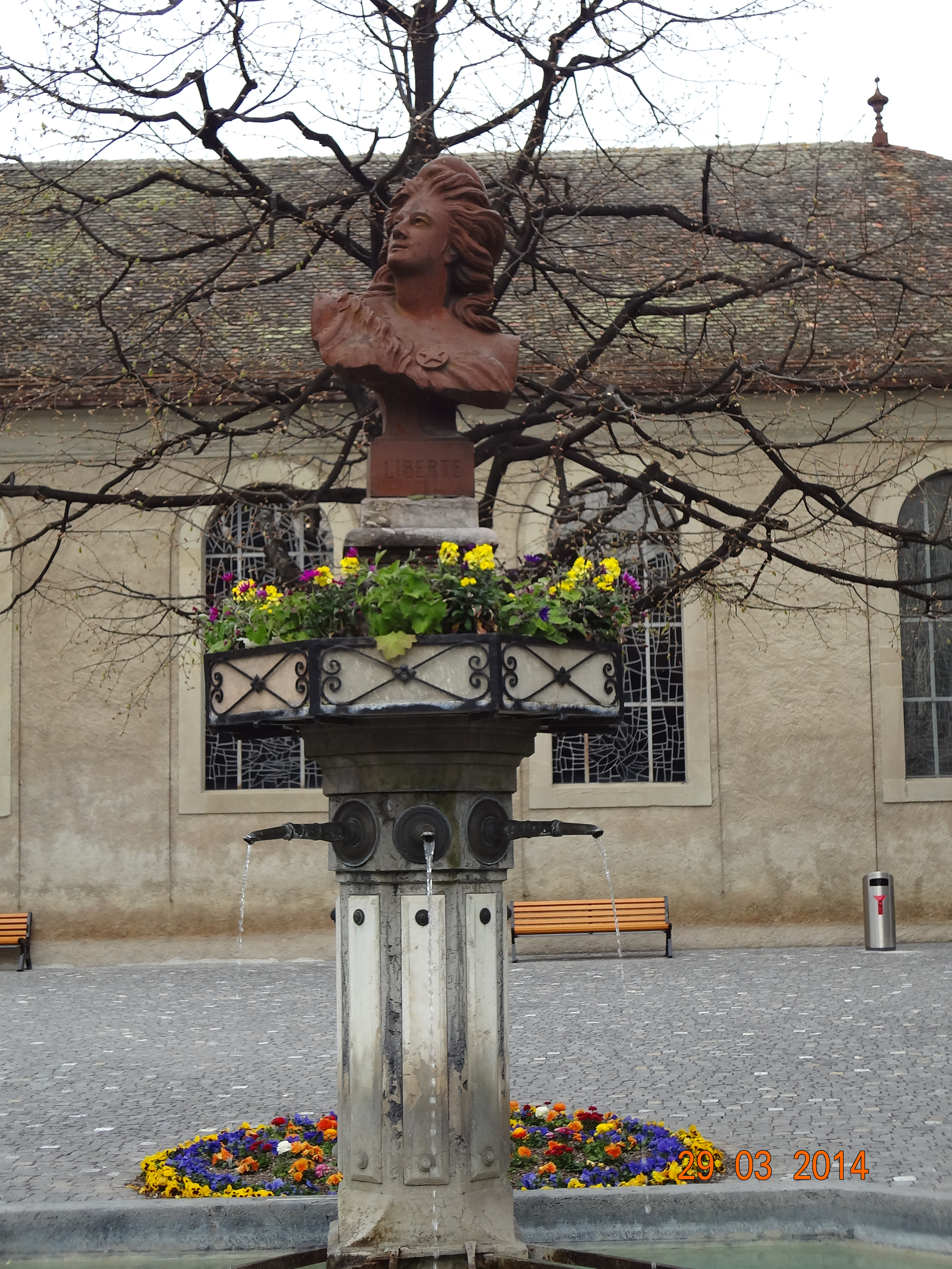 Buste de la Liberté, hommage à l'hospitalité, 1875, buste en fonte bronzée sur la fontaine de la Place du Temple à La Tour-de-Peilz